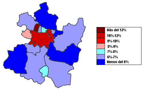 Iruñerriko etorkinen ehunekoa.